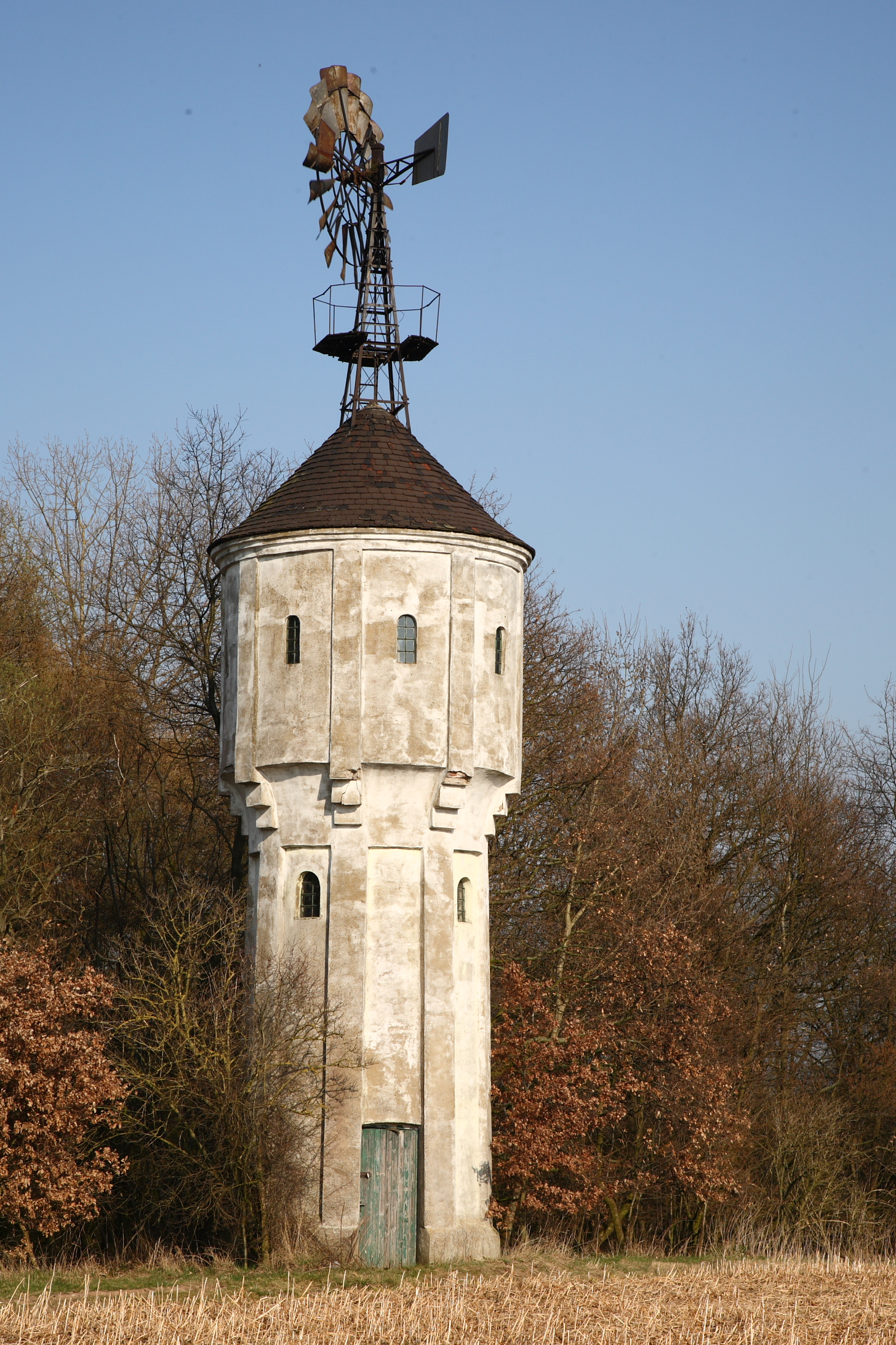 Wasserturm mit Pumpenwindrad (1904/Intze-Behälter/Schweckhausen; Western-Windrad) bei Willegassen/Schönthal, Willebadessen